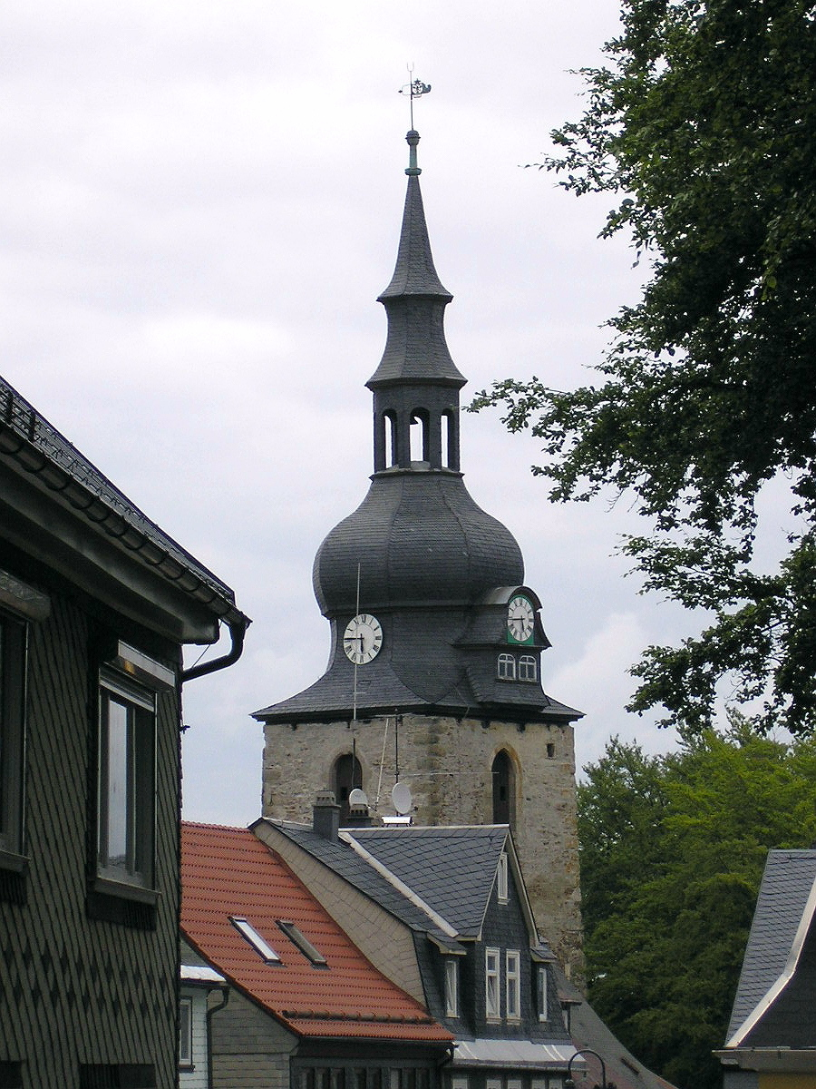 Glockenturm "St. Johannis" in Großbreitenbach (Thüringen).